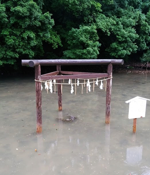 三柱鳥居に囲まれた磯良恵比須